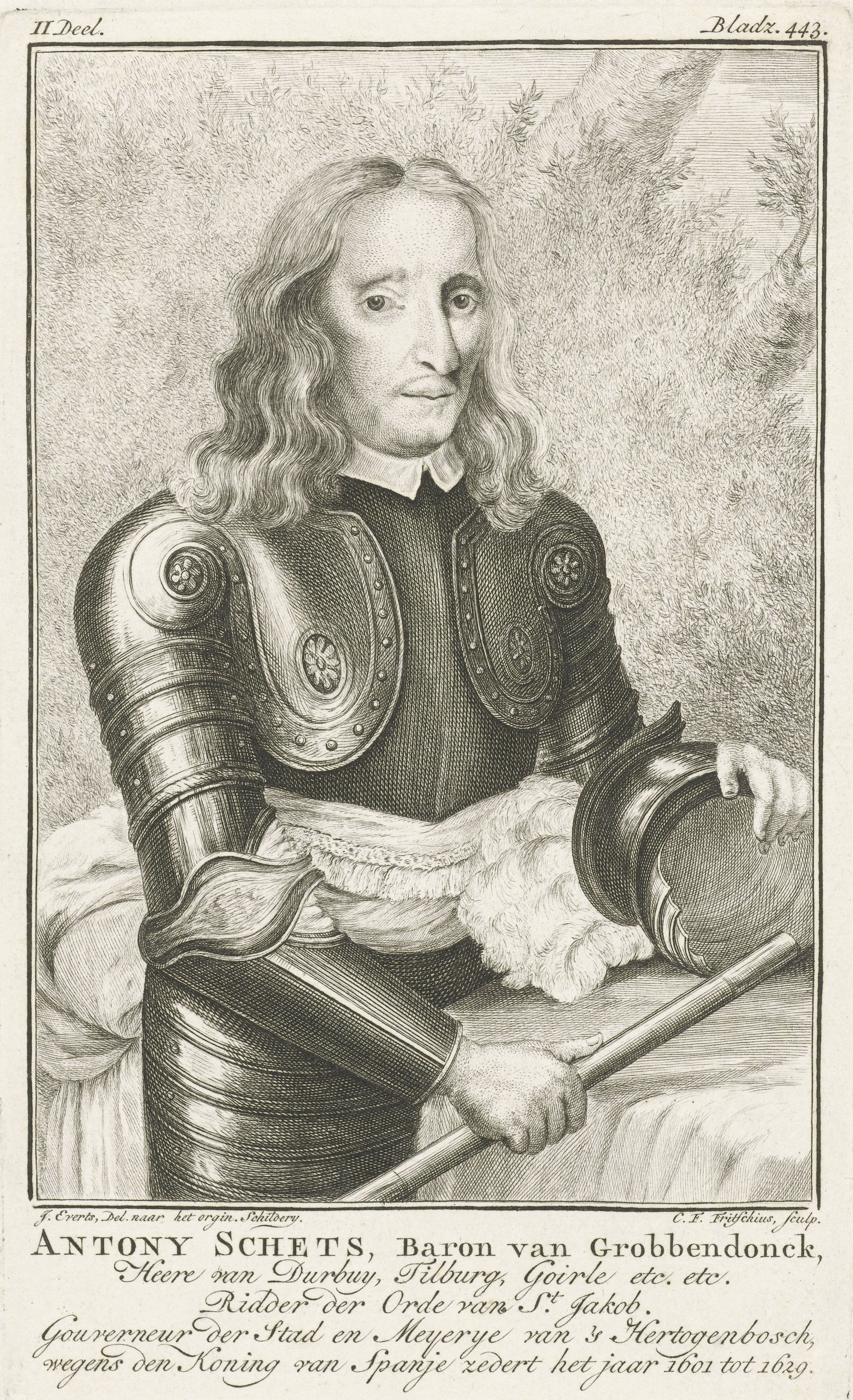 IdentificatieTitel(s): Portret van Anthonie Schets, baron van GrobbendonckObjecttype: prent Objectnummer: RP-P-OB-52.387Catalogusreferentie: FMP 4786-aCollectie Rijksmuseum-2(2)Opmerking: 2 staten, Waar: onder een proefdruk, aanwezig in de collectie van het RijksmuseumOpschriften / Merken: verzamelaarsmerk, verso, gestempeld: Lugt 964Omschrijving: Anthonie Schets, baron van Grobbendonck, ten halven lijve naar rechts, in harnas, met commandostaf in de rechterhand, in de linkerhand een helm met pluimen. Onder het portret staan de naam en titels van de geportretteerde. Links- en rechtsboven gemerkt: II Deel - Bladz. 443.VervaardigingVervaardiger: prentmaker: Christian Friedrich Fritzsch (vermeld op object)naar tekening van: J. Everts (tekenaar) (vermeld op object)Datering: 1776 - 1778Fysieke kenmerken: etsMateriaal: papier Techniek: etsenAfmetingen: plaatrand: h 184 mm × b 113 mmToelichtingPrent opgenomen in: Heurn, Johan Hendrik van. Historie der stad en meyerye van 's Hertogenbosch, 4 delen. Utrecht: Johannes van Schoonhoven & Comp, 1776- 1778, deel 2.OnderwerpWie: Anthonie Schets baron van GrobbendonckVerwerving en rechtenCredit line: Schenking van de heer D. Franken, Le VésinetVerwerving: schenking 1871Copyright: Publiek domein